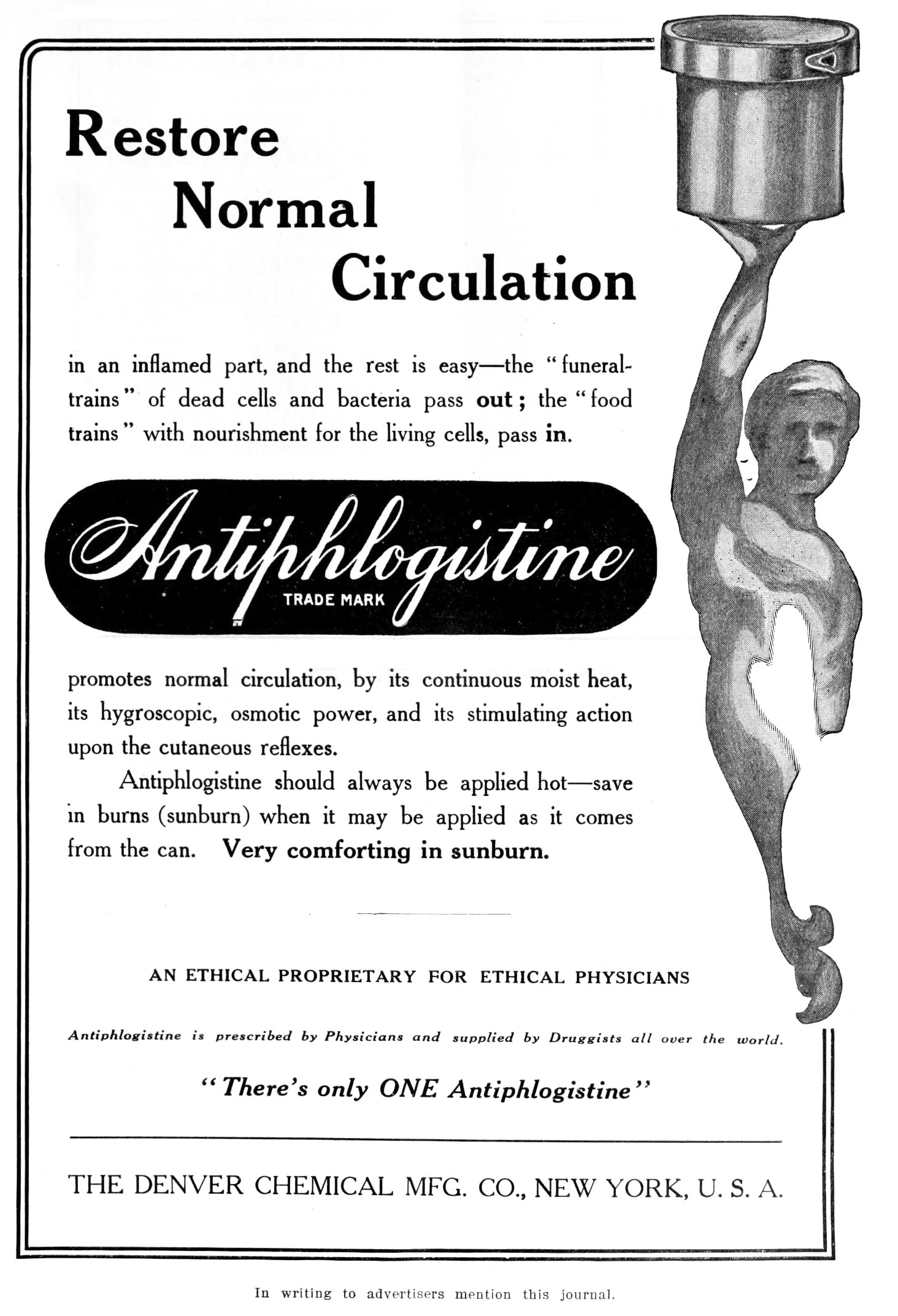 1914 Advertisement for "Antiphlogistine"